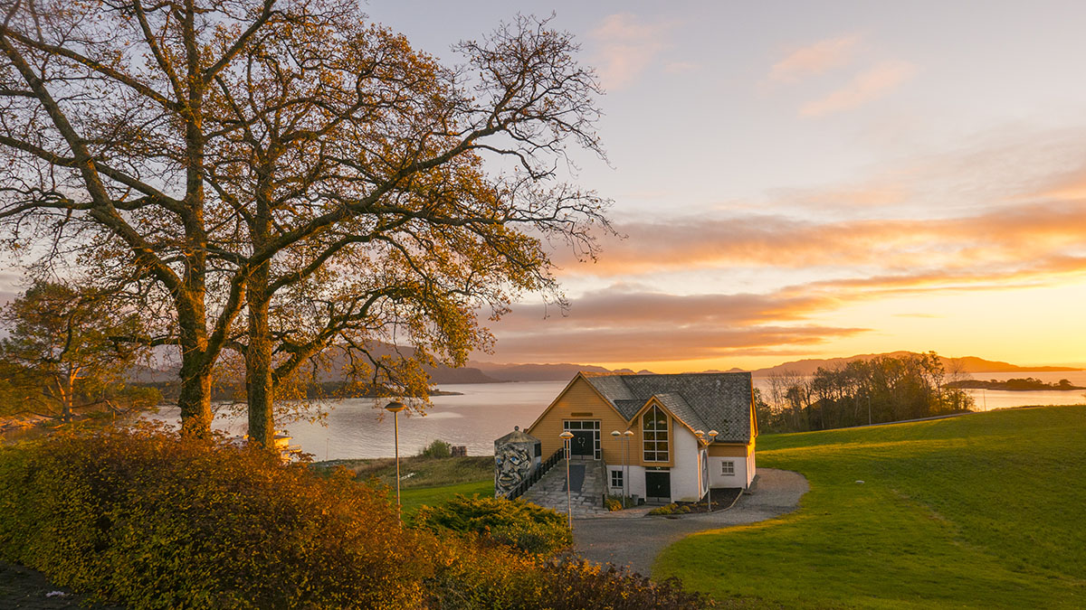 Solnedgang en høstdag på Sunnhordland folkehøgskule.